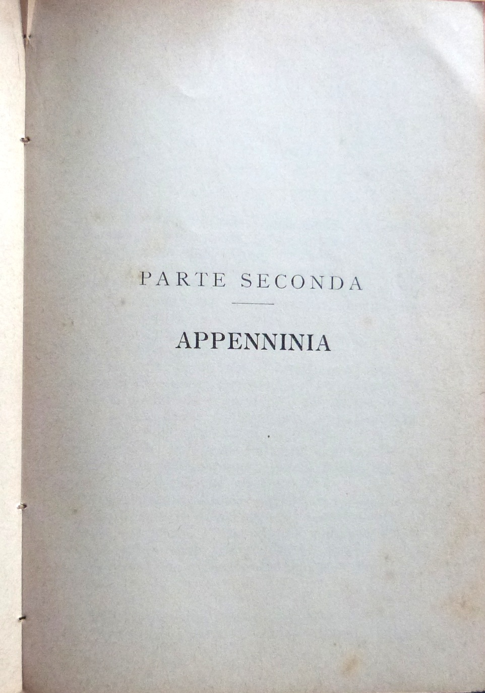 Lumbaart: Pàgina del lìber del profesùr Angelo Mariani